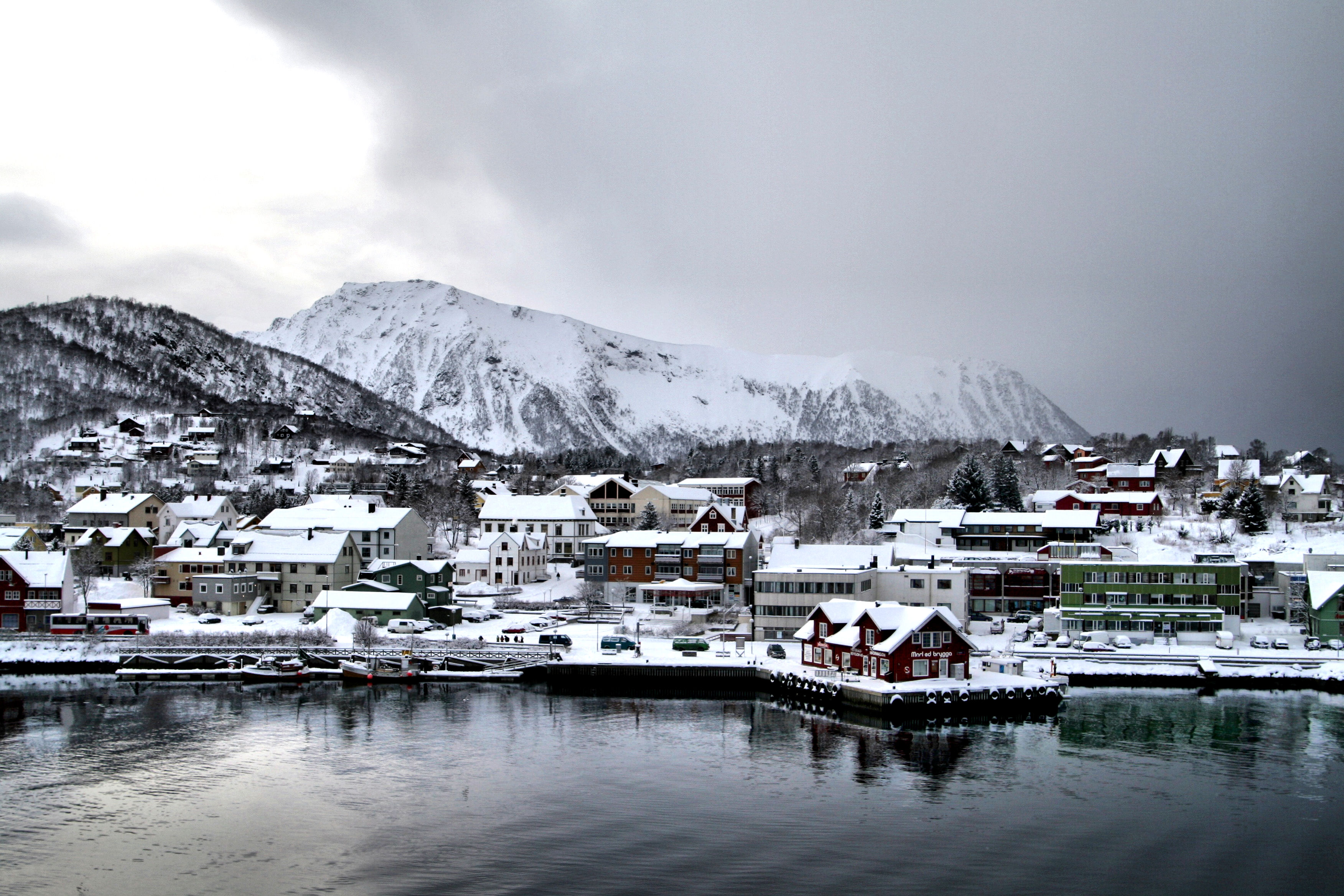 Stokmarknes,Vesterålen, Norway. Winter 2005-2006